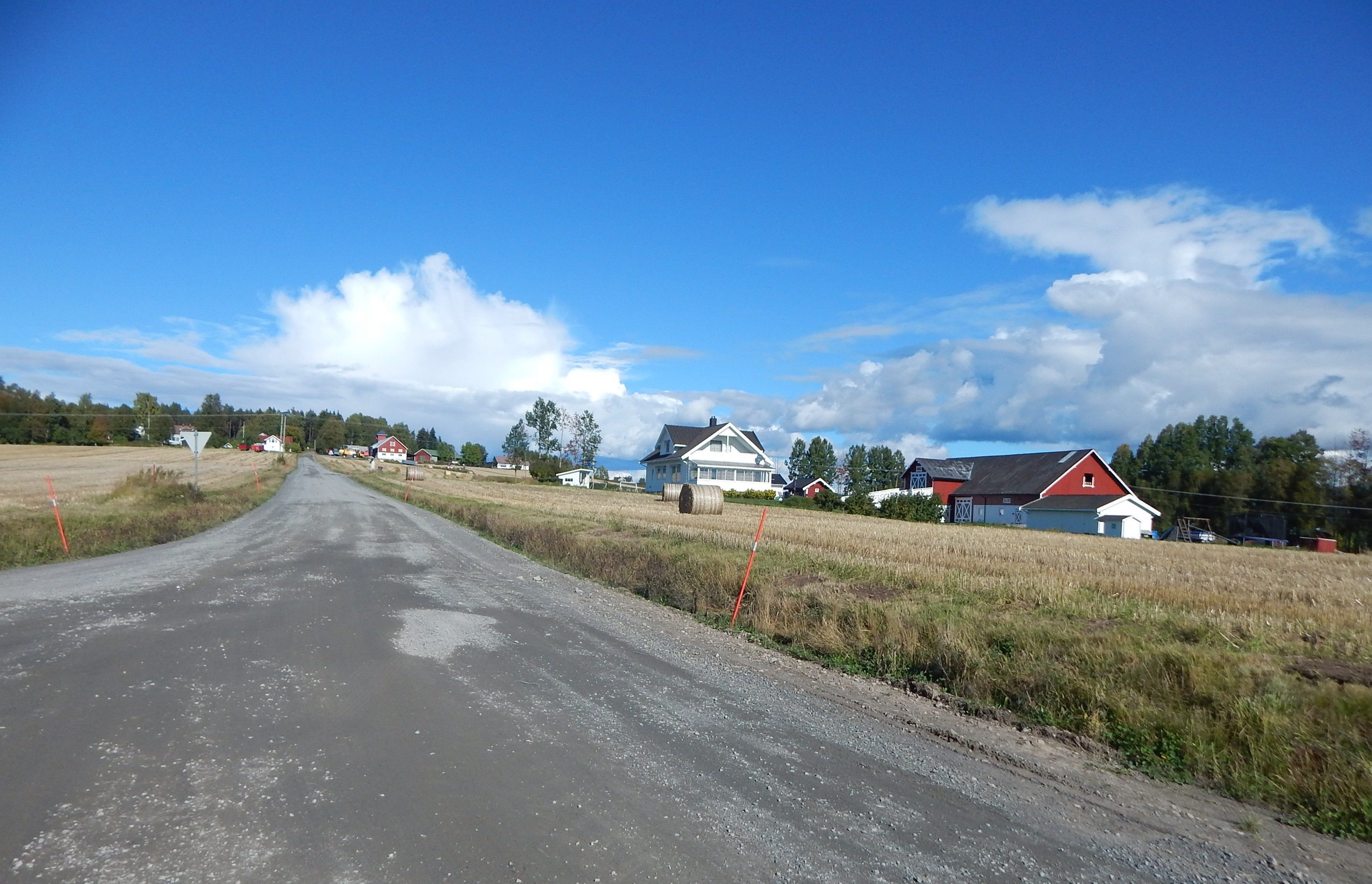 Østre Strætåsvegen (fylkesvei 498) sett fra Svenskevegen (fylkesvei 455)